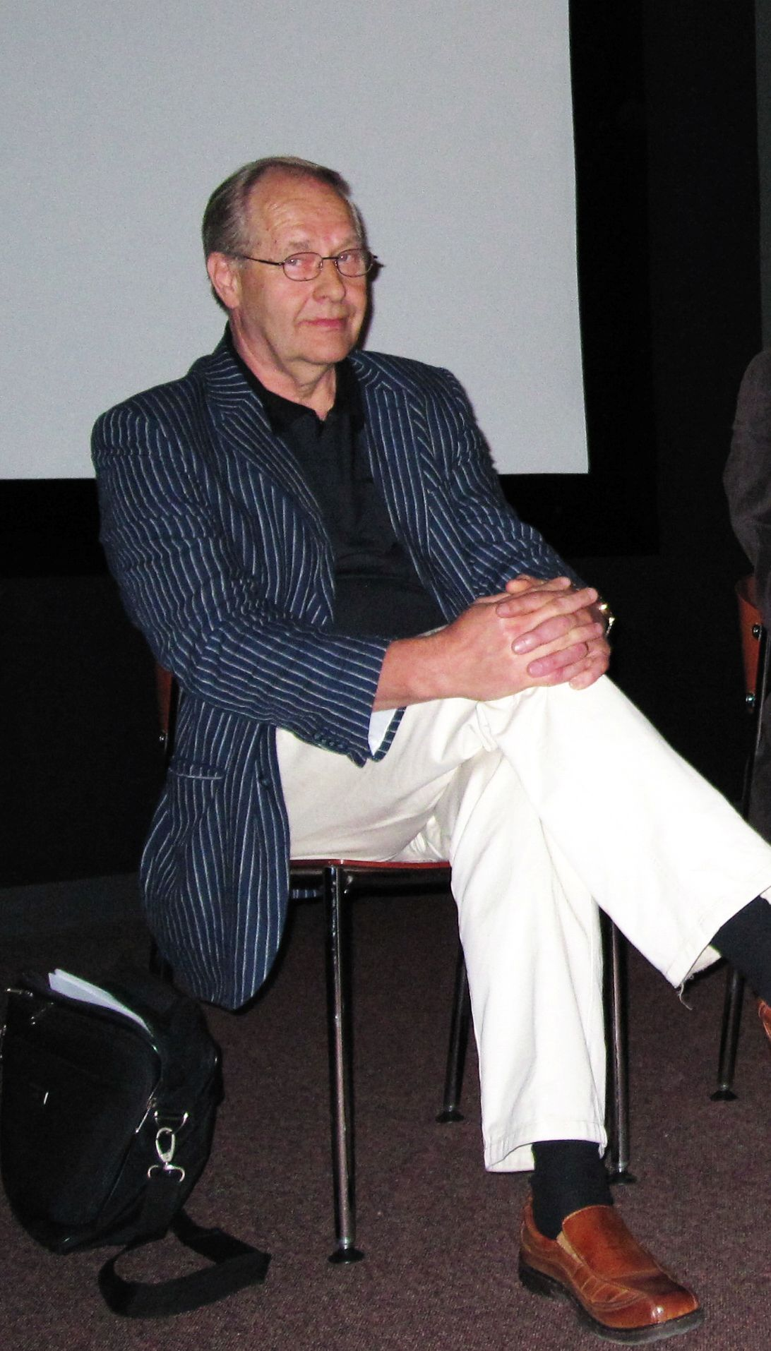 Matti Kauppila kansaedustaja